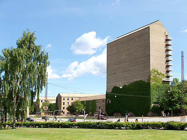 Aarhus Universitet Aarhus, Denmark